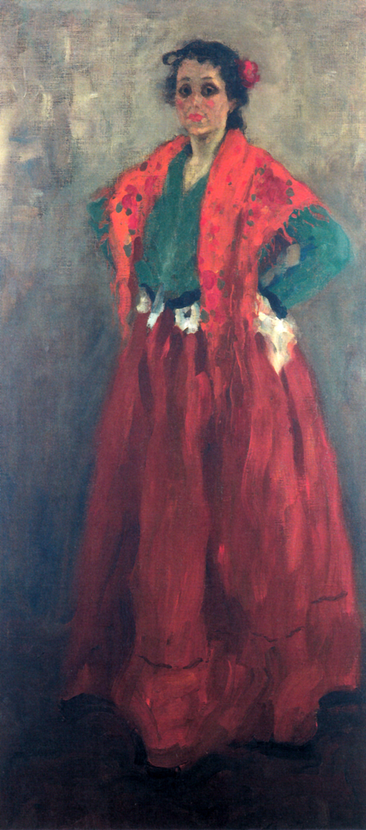 Museum Wiesbaden, Stiftung Frank Brabant, 2014